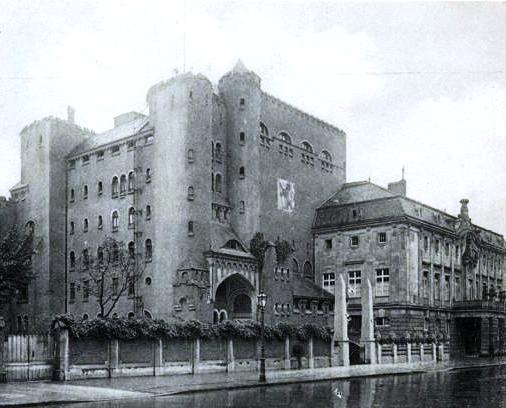 Düsseldorf, Schauspielhaus an der Karl-Theodor-Straße, erbaut von Sehring 1905, Ansicht